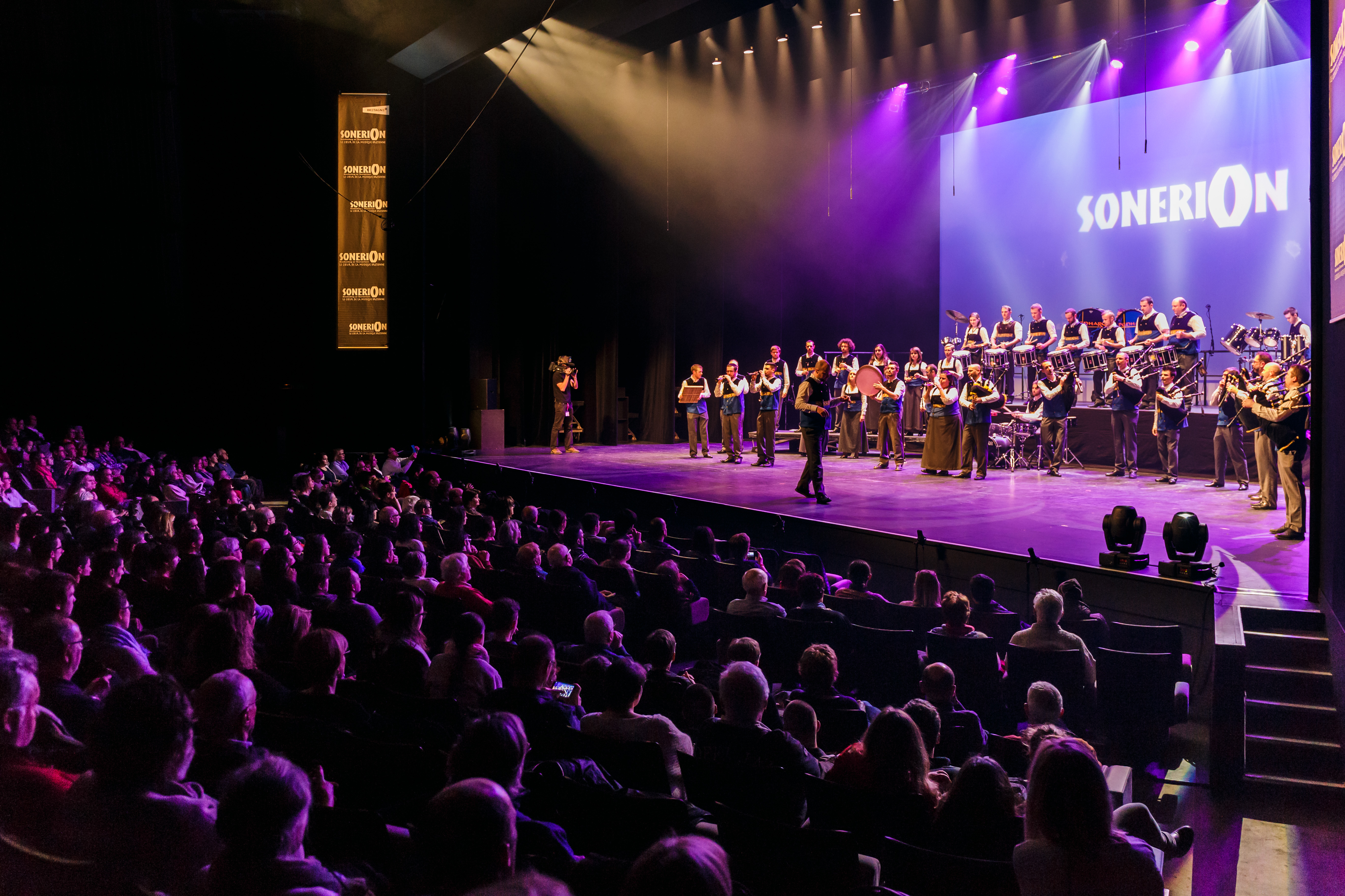 Prestation du bagad Penhars (Quimper) lors de l'épreuve d'hiver du Championnat national des bagadoù de Première catégorie organisée au Quartz à Brest le 12 février 2017.